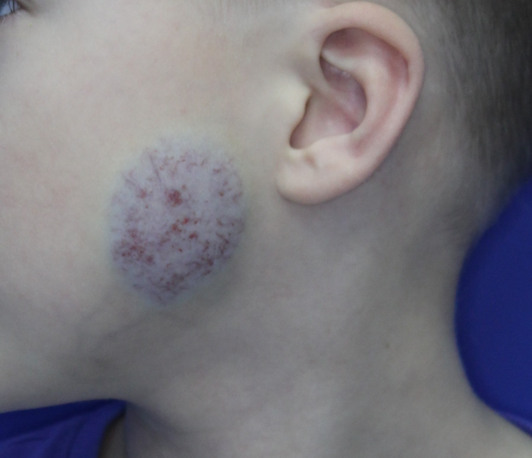 Врожденная не инволюционирующая гемангиома (Noninvoluting congenital hemangioma) (NICH)